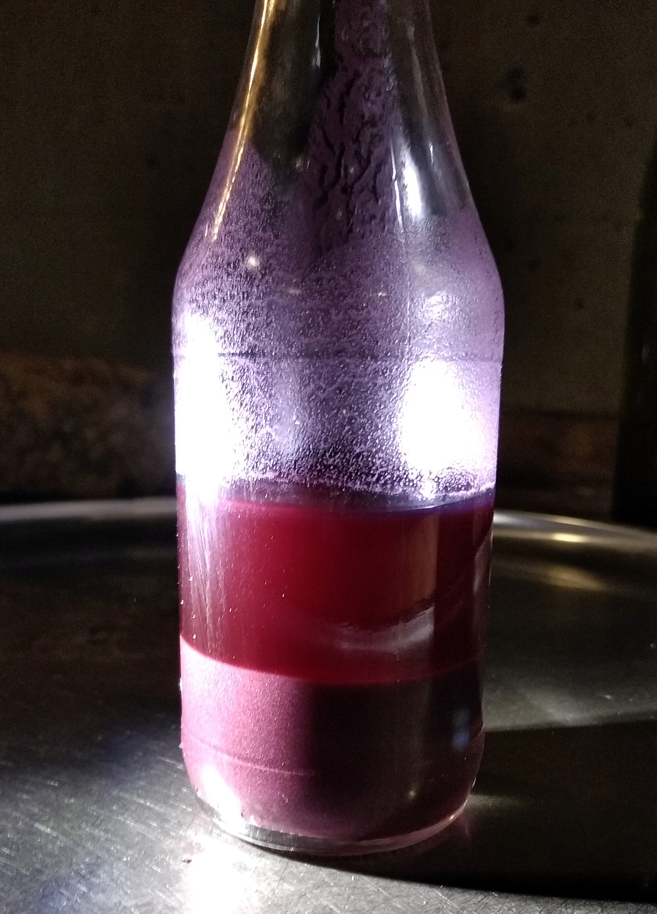 Echantillons de vin avec un dépot de lies dans le fond.